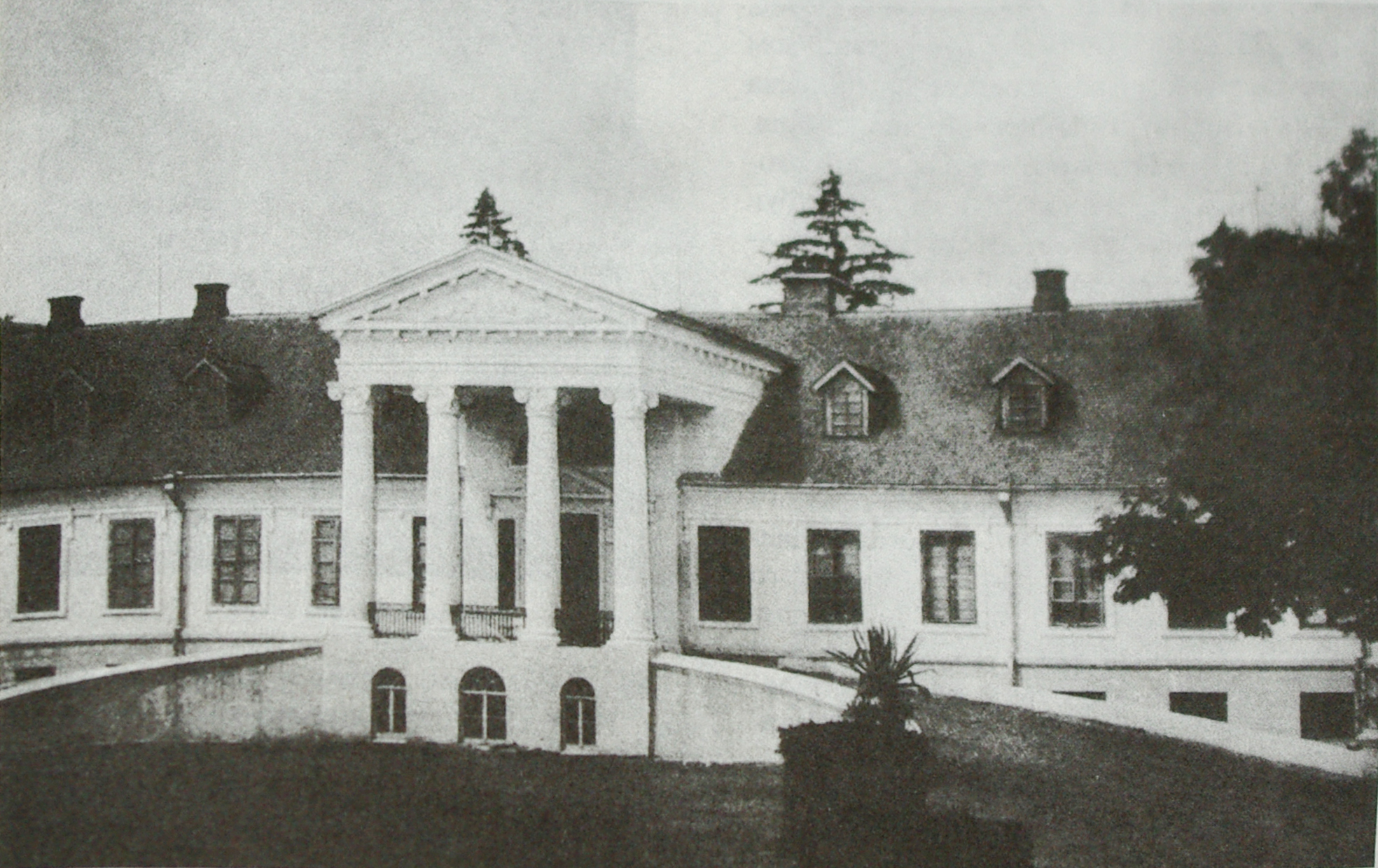 з книги "Історія Тиврівщини"